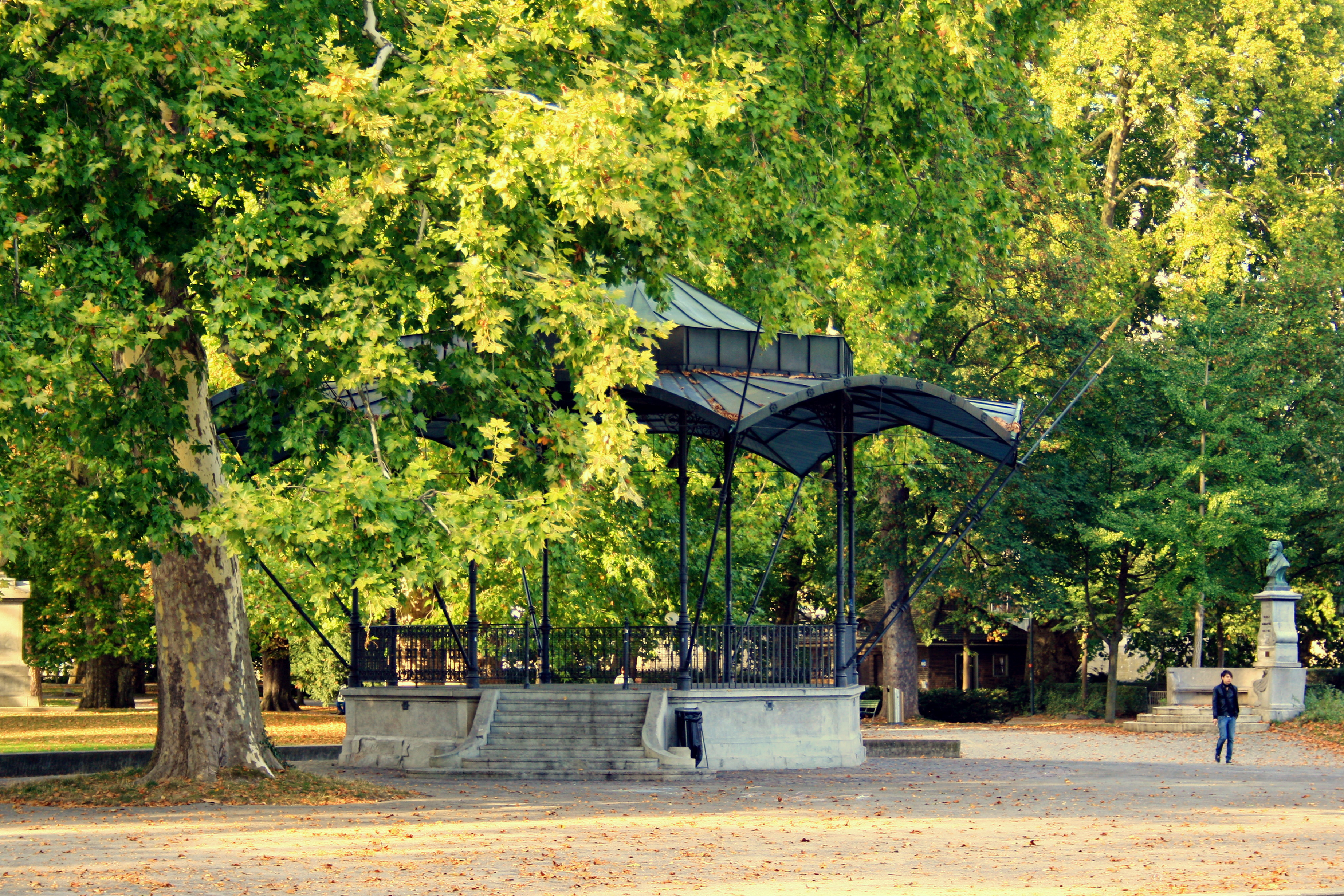 Platzspitz park in Zürich (Switzerland)